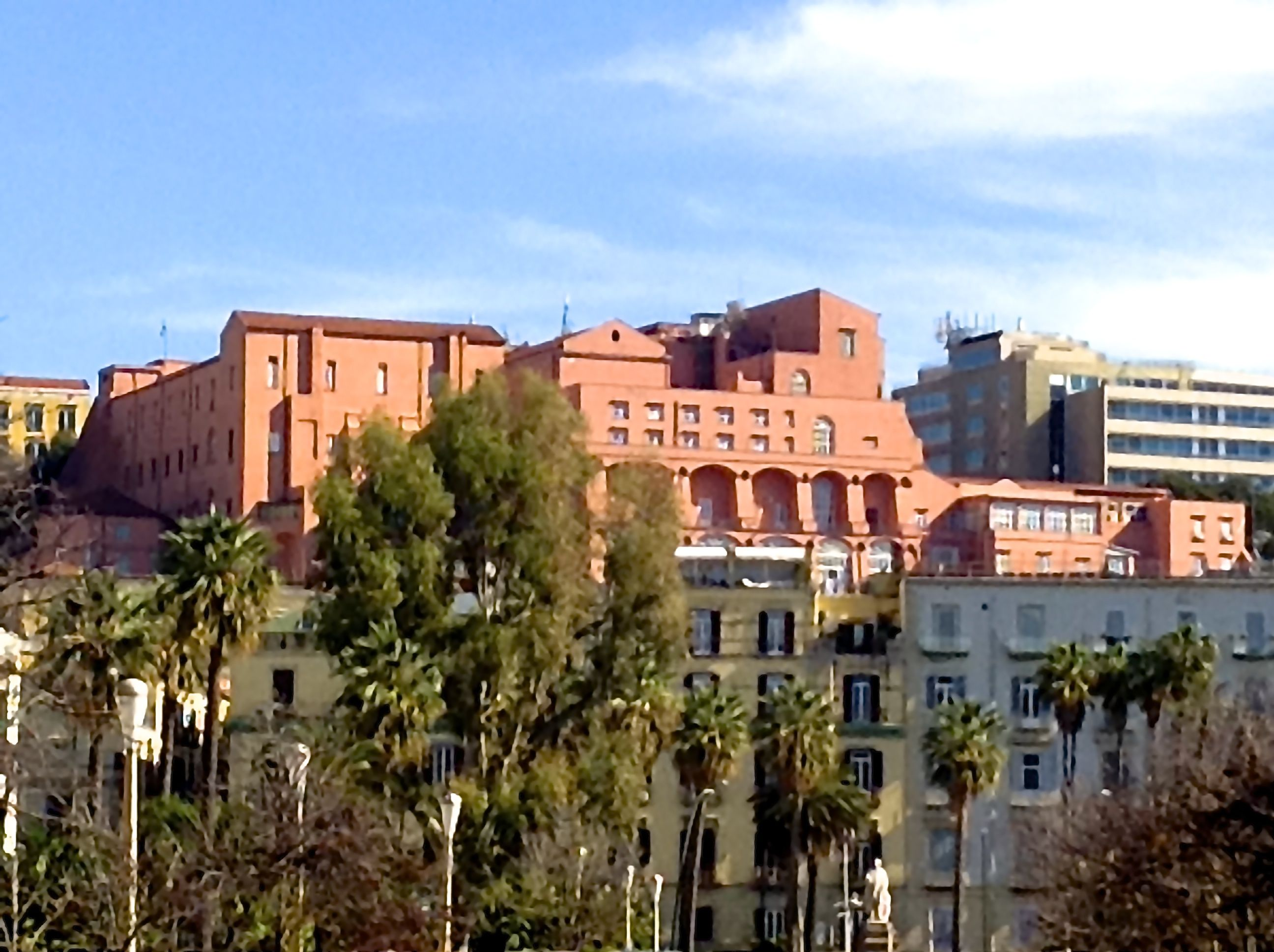 La Scuola Militare Nunziatella vista dalla Villa Comunale di Napoli